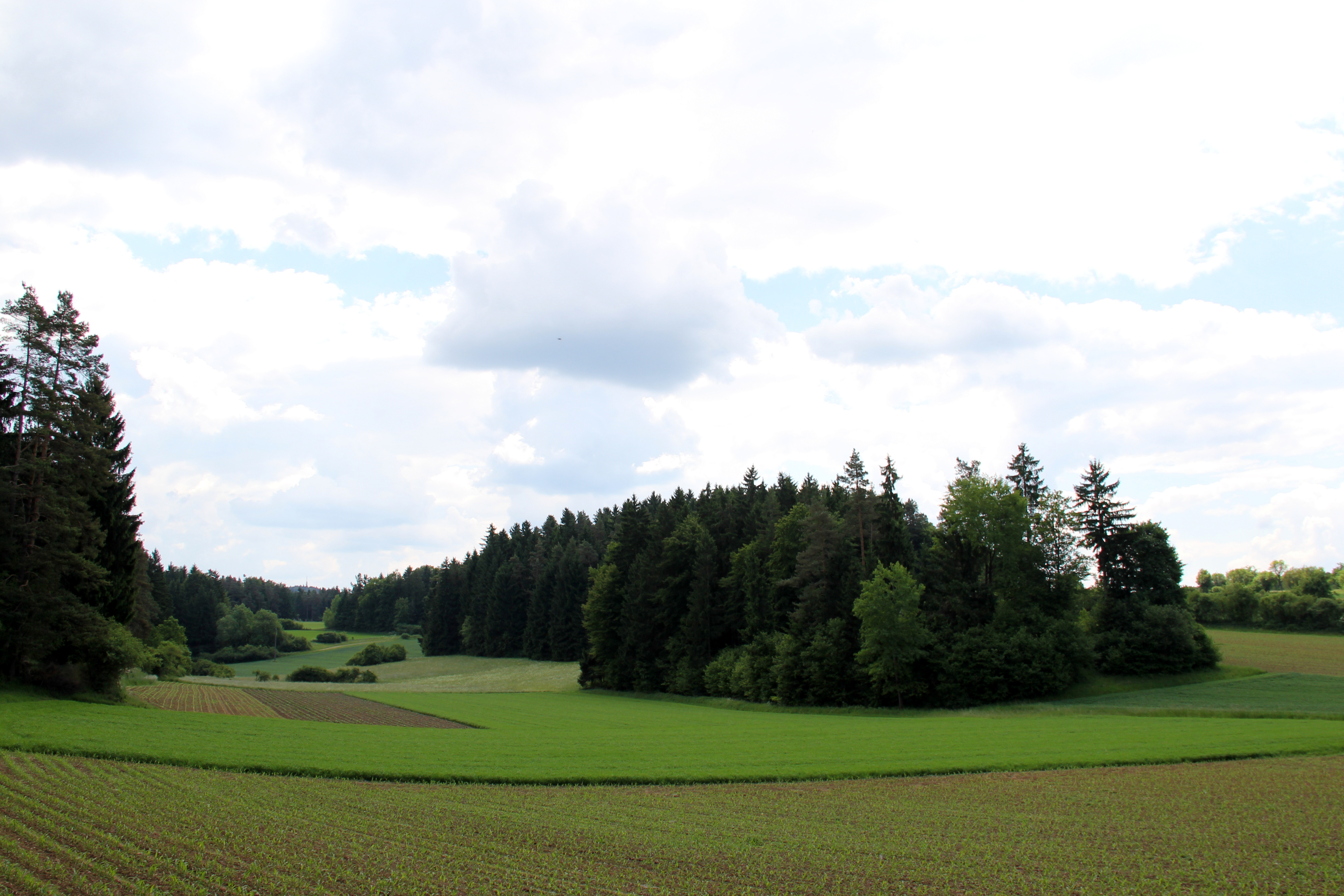 Oberes Ankatal